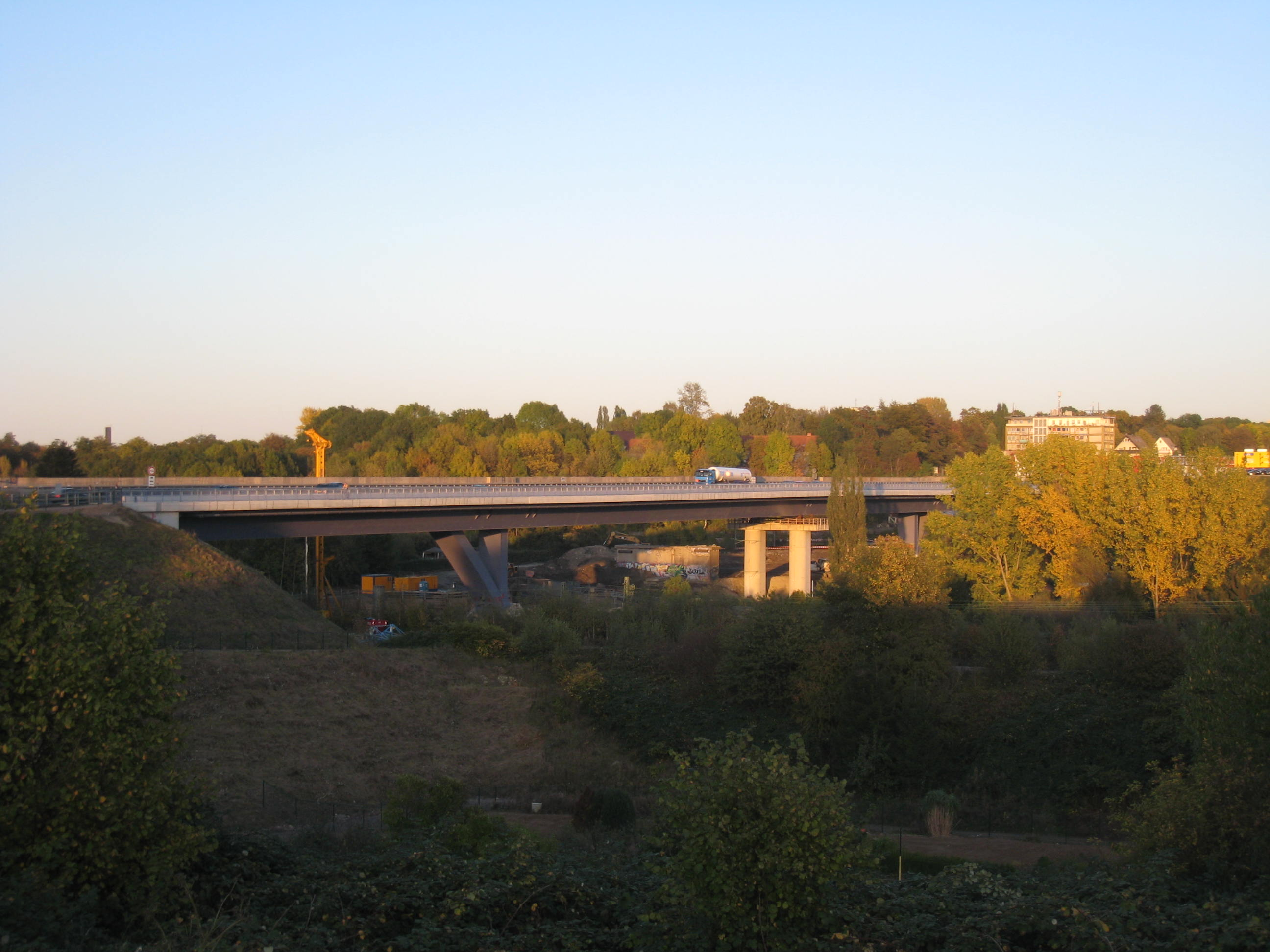 Schnettkerbrücke Neubau Dortmund